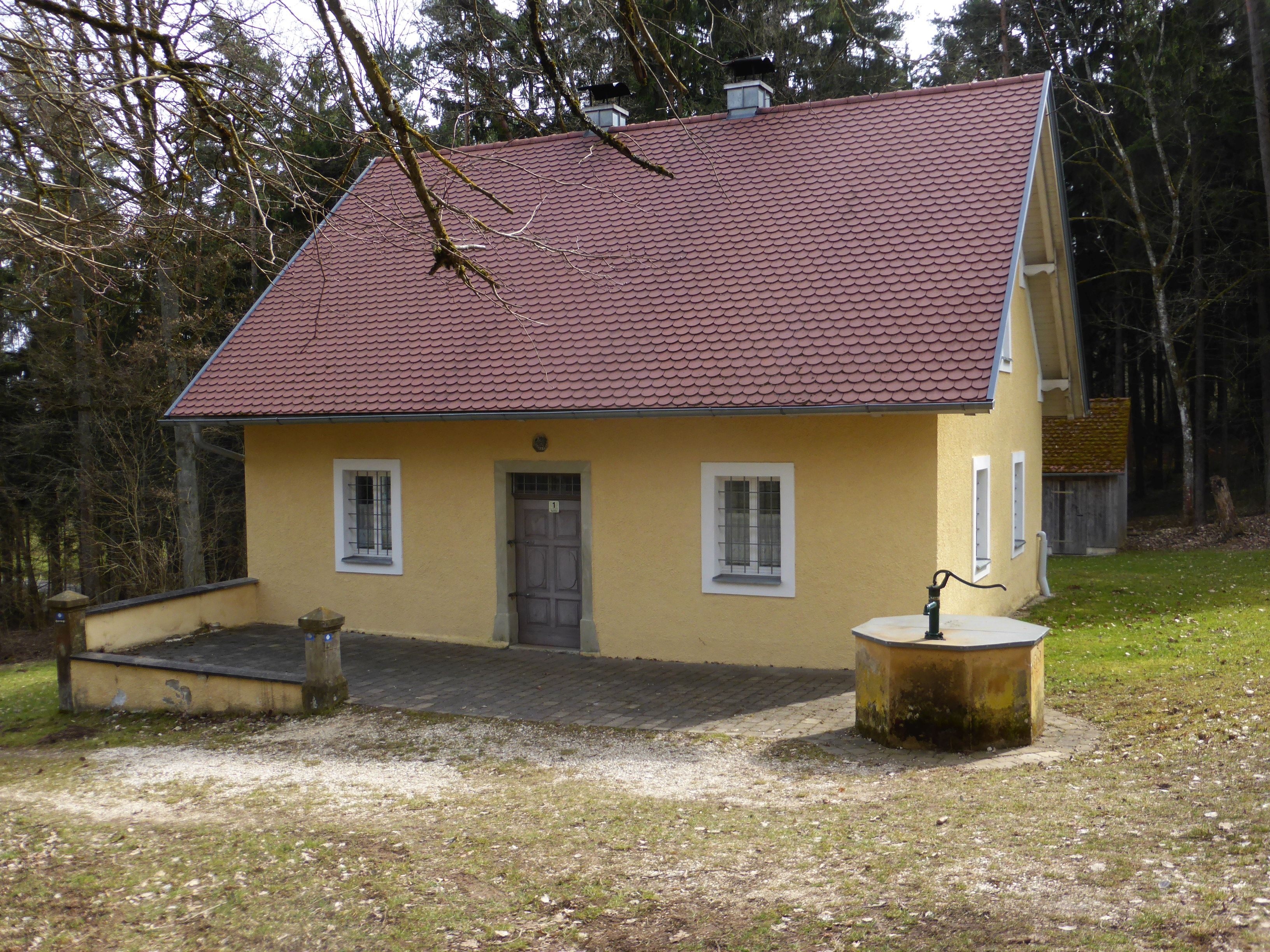 Nebengebäude der Katholischen Wallfahrtskirche St. Dionys und Nothelfer (Ensdorf)